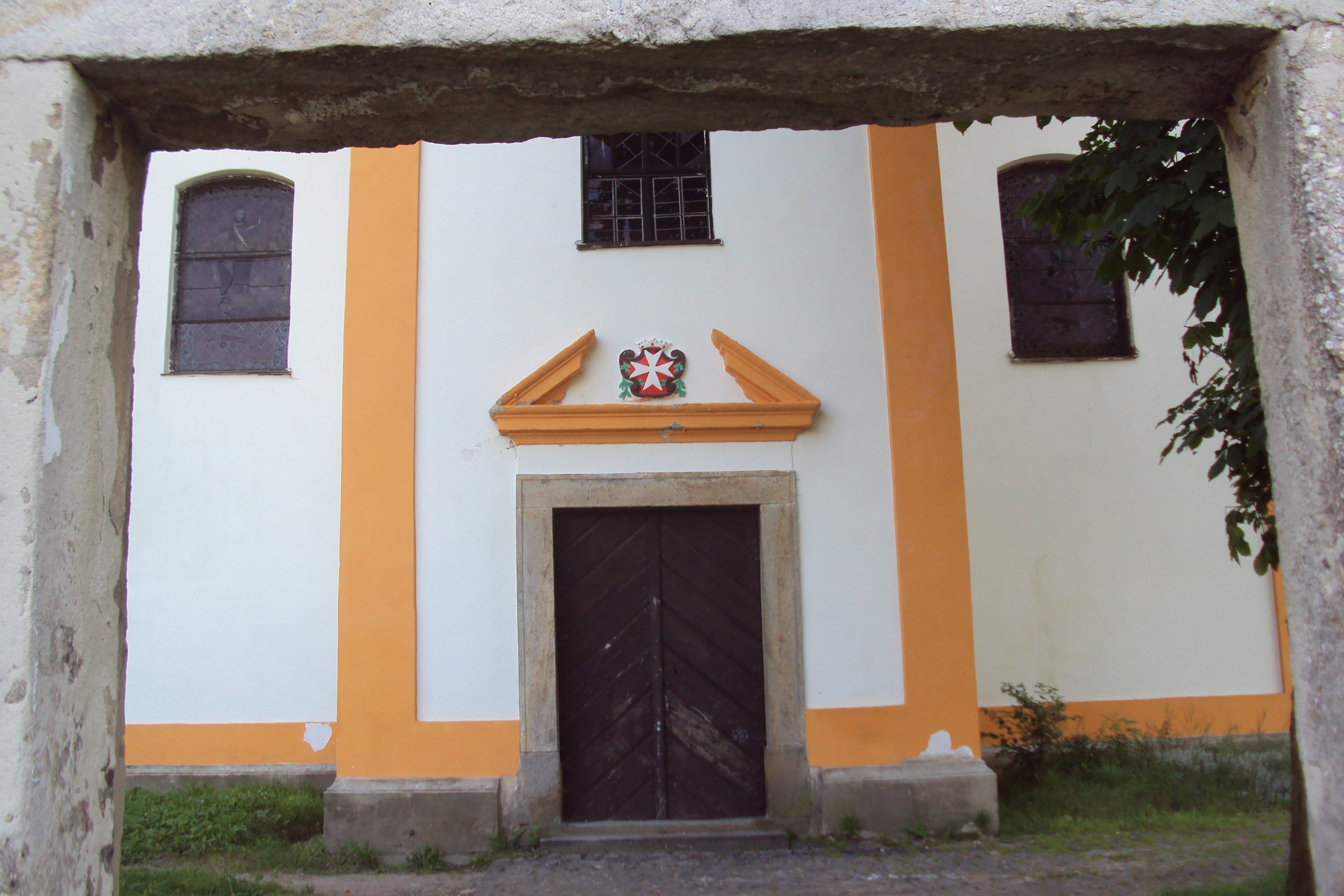 Česky: Znak maltézských rytířů na kostele sv.Anny v Skalici u České Lípy